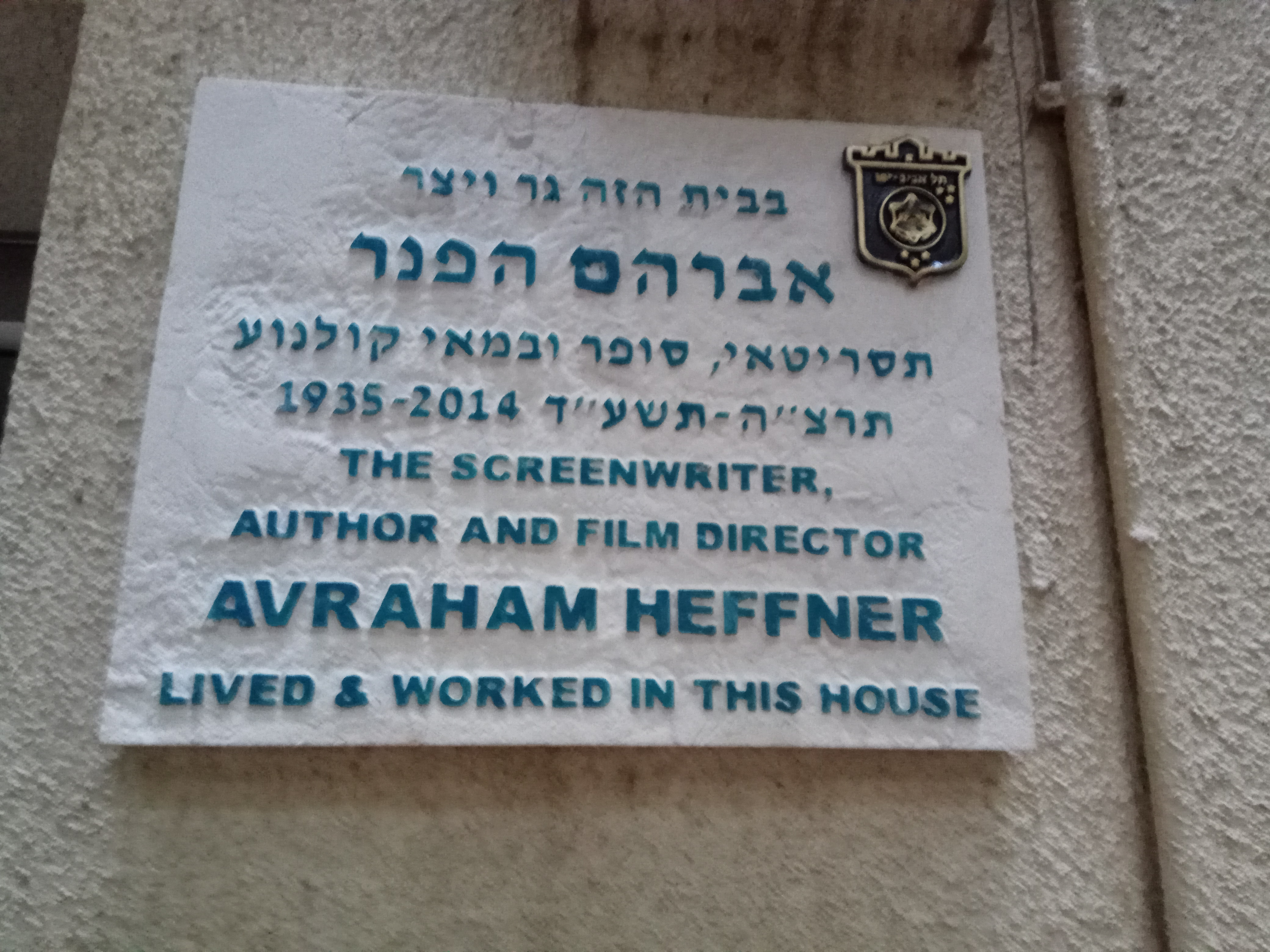 לוחית זיכרון על ביתו של אברהם הפנר ברחוב נחום הנביא 8 בתל אביב